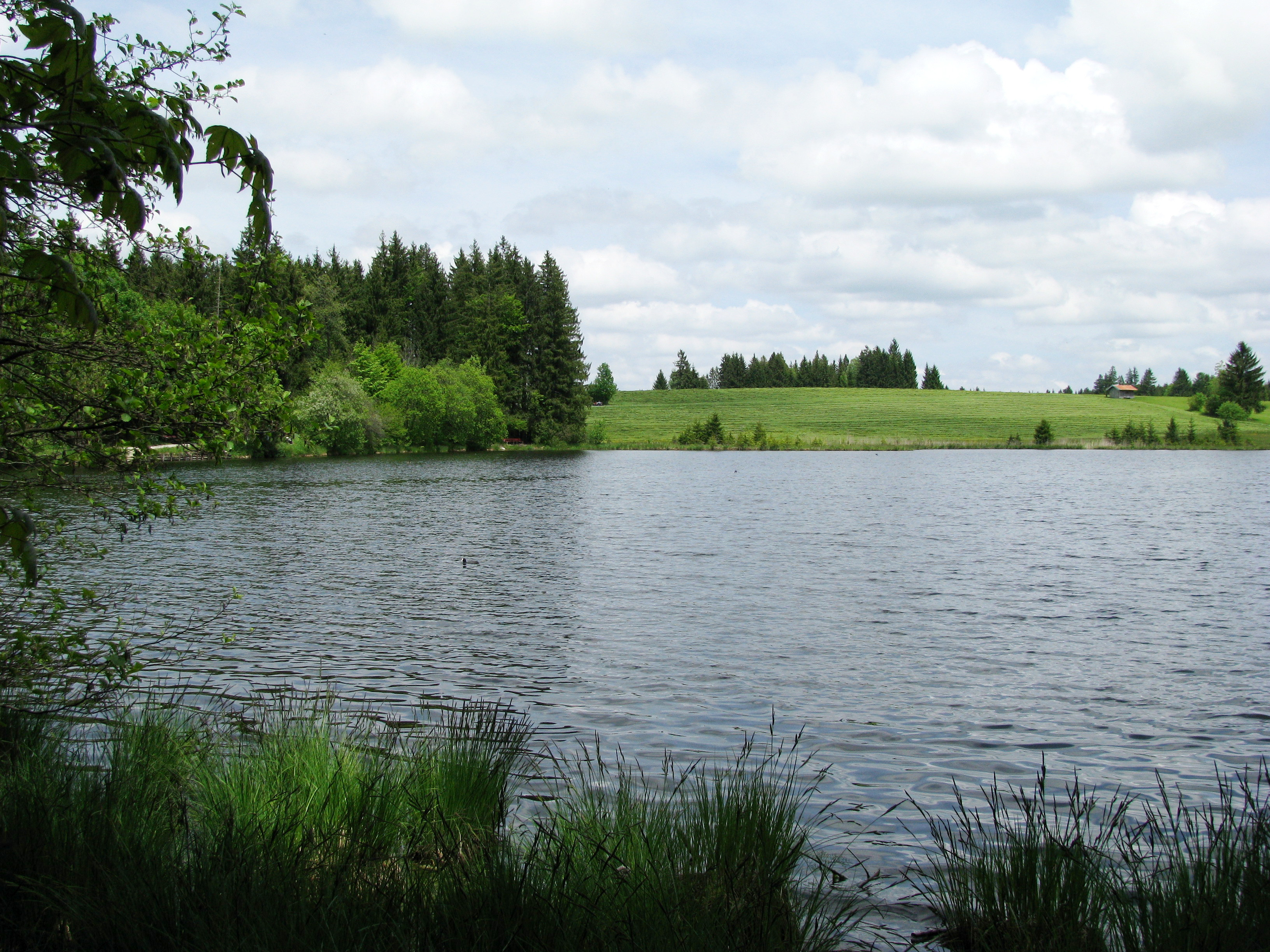 Kögelweiher, nordwestlicher Teil nach Norden.